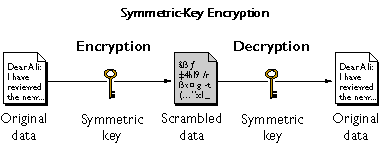 Монгол: Симметрик түлхүүрийн шифрлэлт